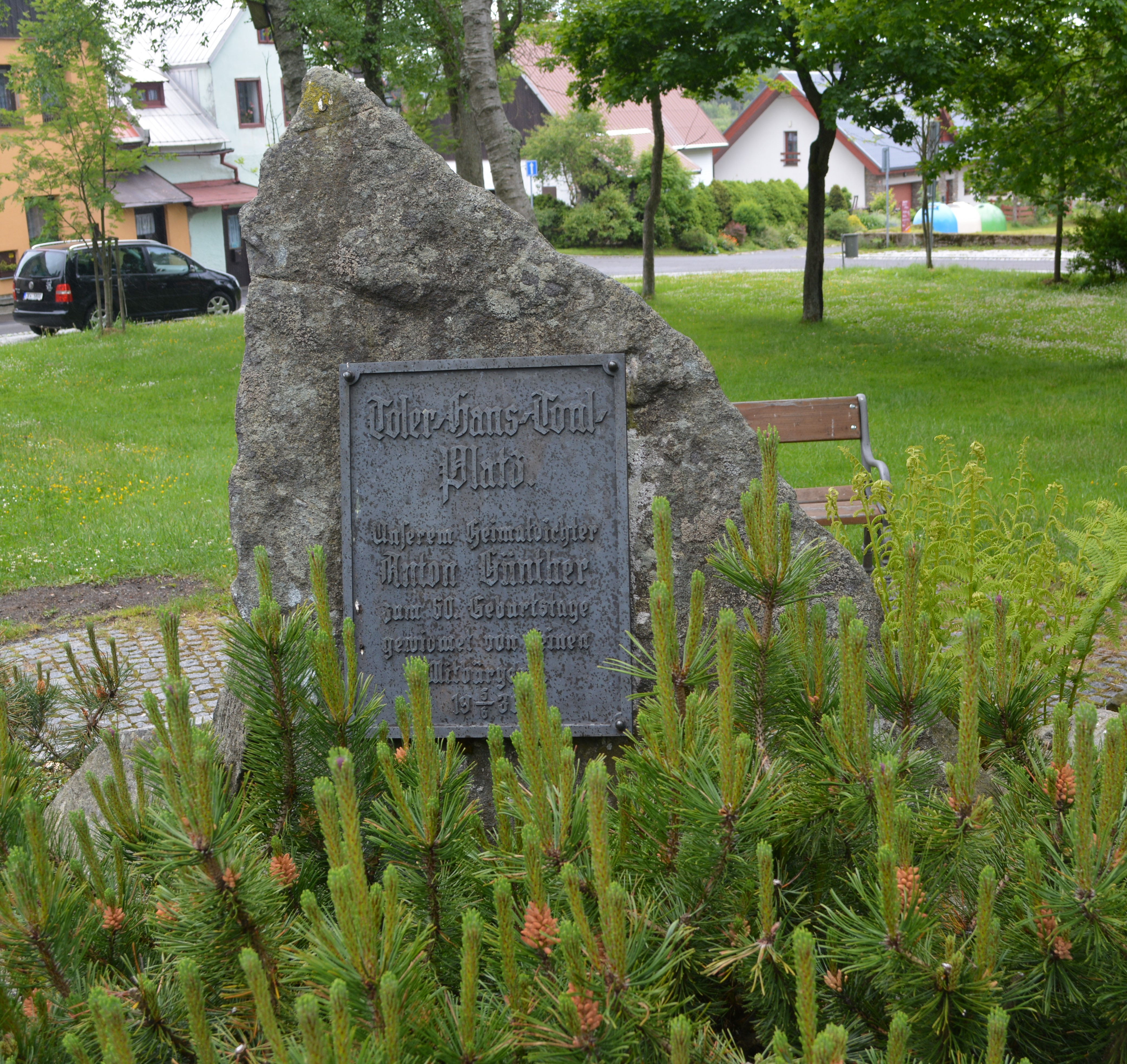 Denkmal für den Volkslieddichter Anton Günther, errichtet 1936, in Gottesgab (Bozi Dar)